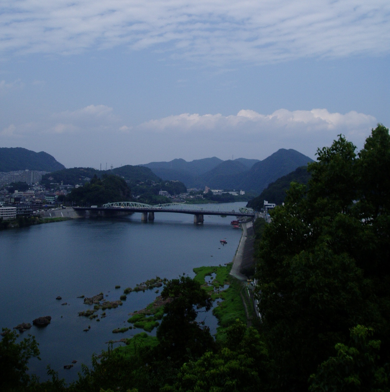 Photo personnelle